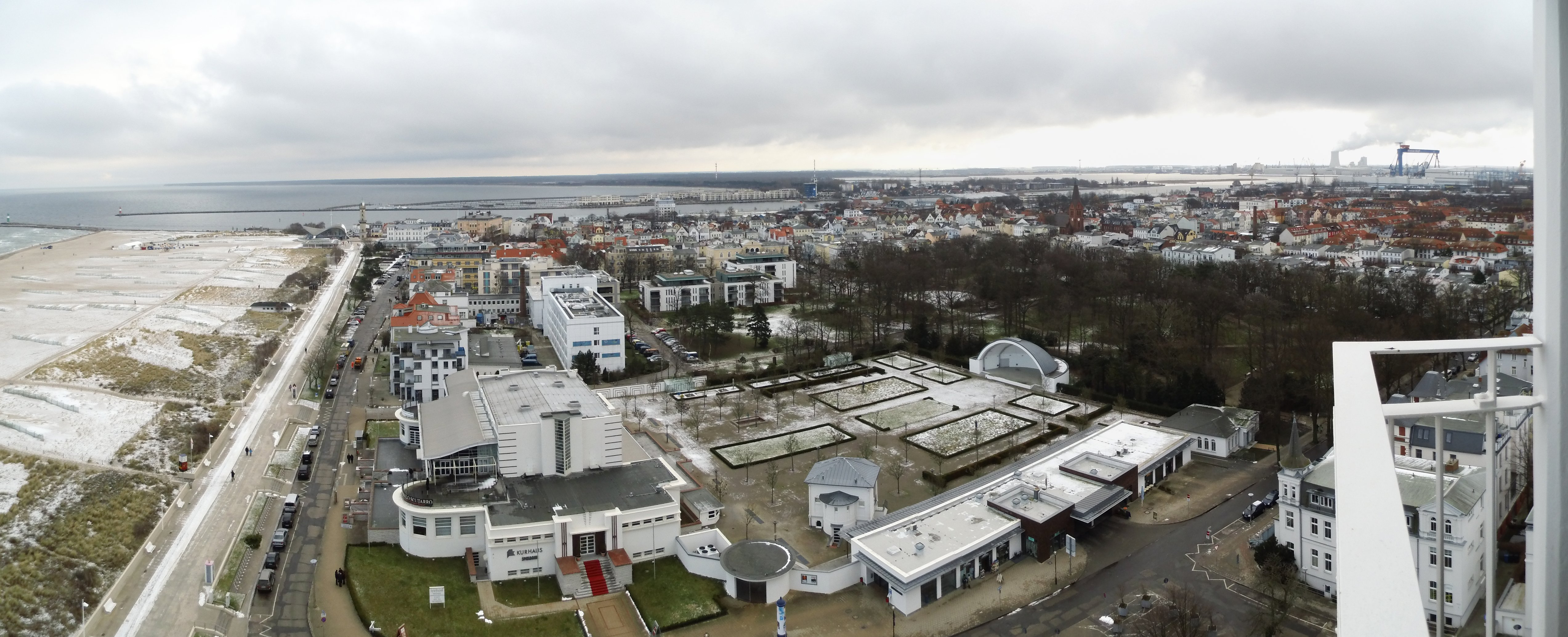 Panorama aus dem 18. Stock des Hotels Neptun Richtung Osten, mit der Strandpromenade bis zur Warnow. Im Vordergrund das Kurhaus Warnemünde mit anschließendem Konzerplatz und Konzertmuschel.